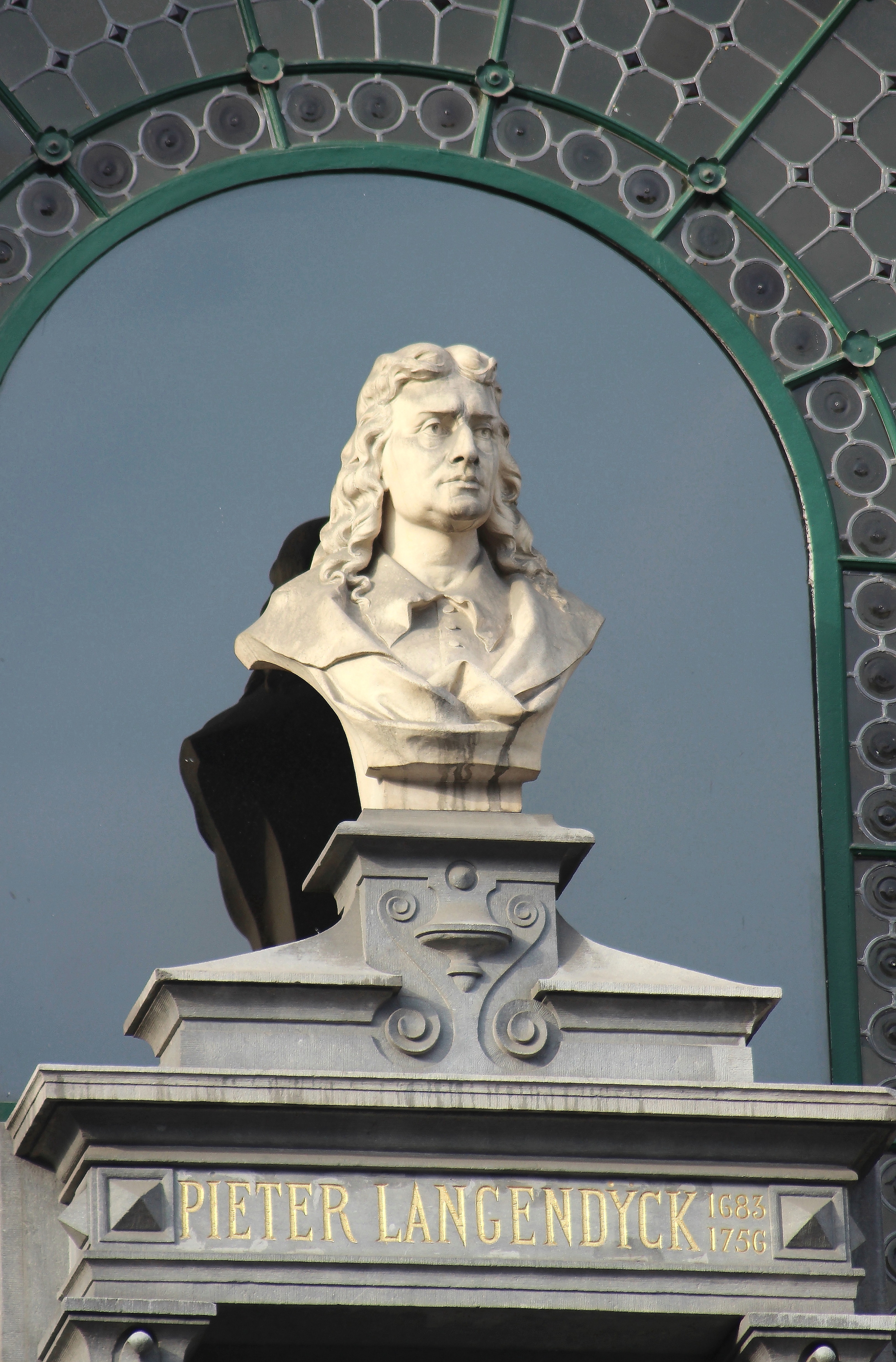 Théâtre royal flamand, rue de Laeken, bruxelles. Façade : buste de Pieter Langendyck